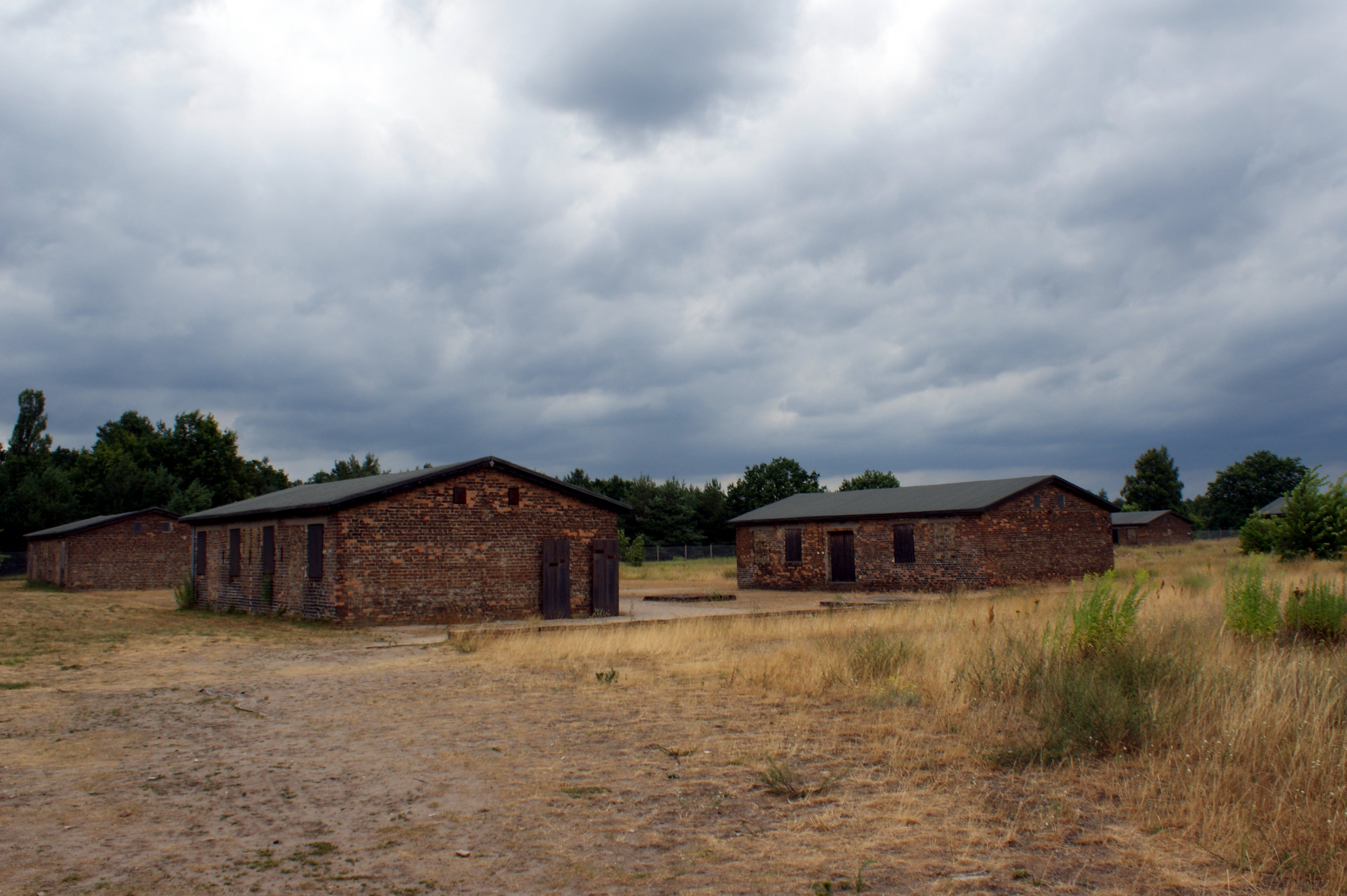 Baracken nahe dem KZ Sachsenhausen